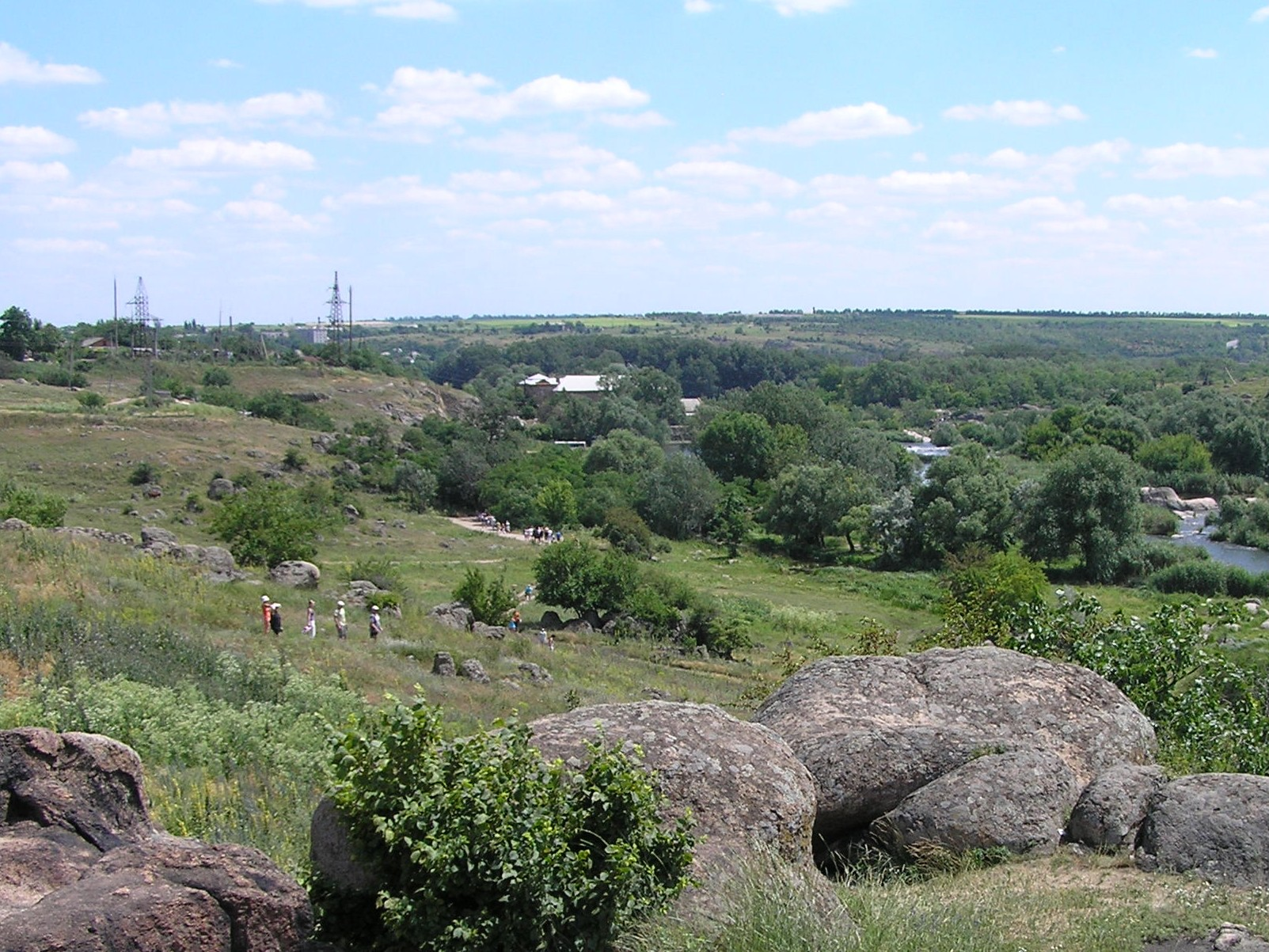 Mygia_view.jpg: Вид на село Мигія